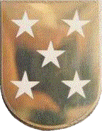 Escudo_de_Tagarabuena (Toro, Zamora)